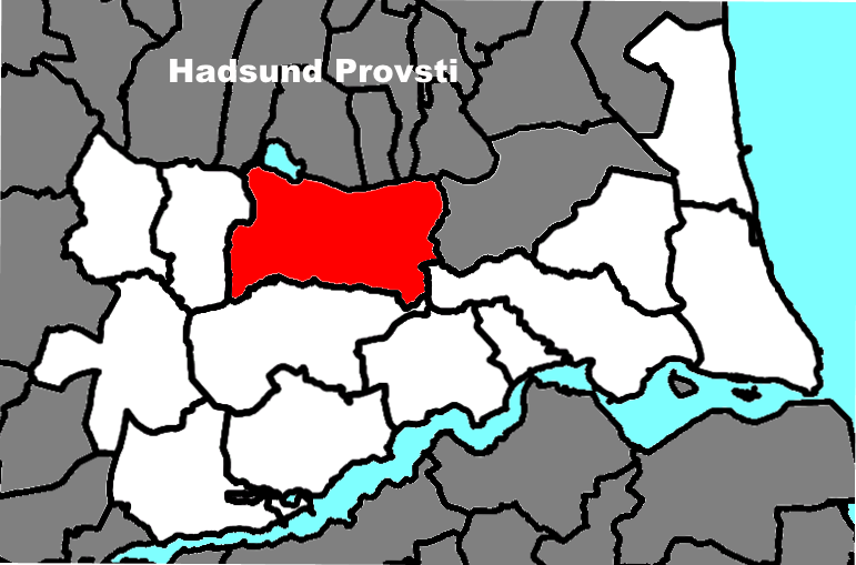 Sognets beliggenhed i Hadsund Provsti.